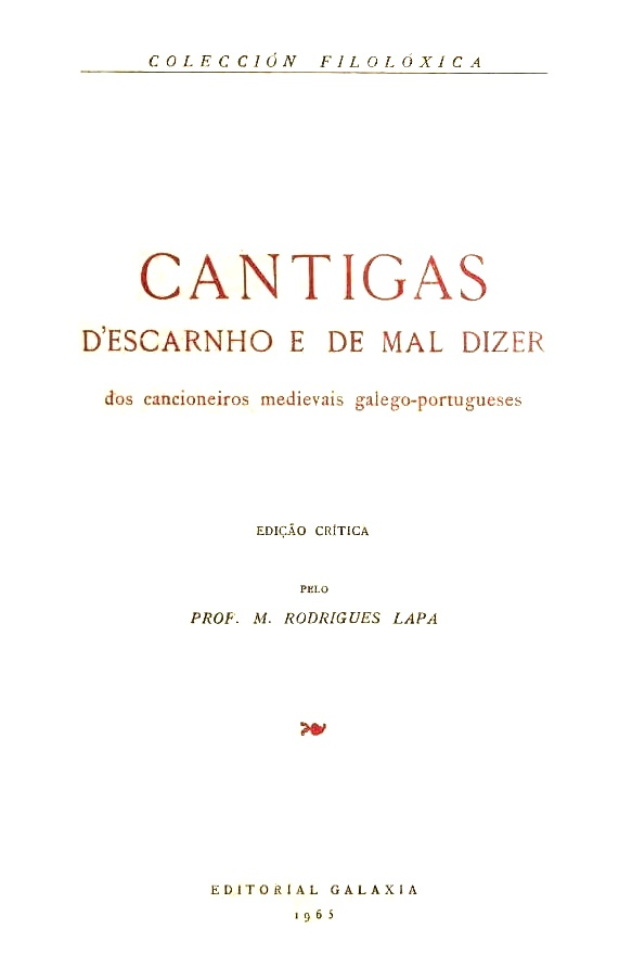 Colección filolóxica. Cantigas d'escarnho e de mal dizer dos cancioneiros medievais galego-portugueses. Edição crítica pelo Prof. M. Rodrigues Lapa.